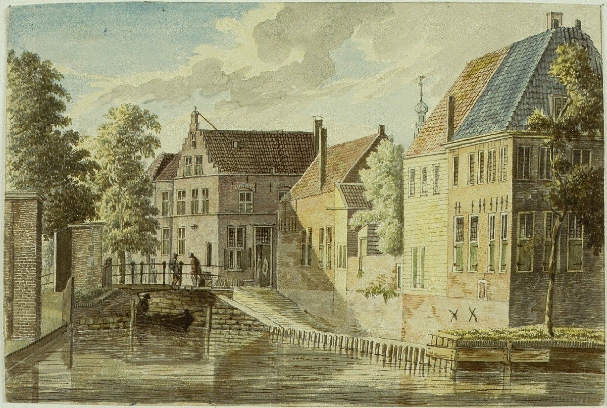 Brug bij Korte Jansstraat (Korte Jansbrug), noordzijde en paardenwed. Aquarel van H.Tavenier, 1779. h.18½ x 28 cm. Dia aanwezig. Herkomst: geschonken in 1852 door Thomas Wilson (KB 3 nr.80). Catalogus 1864 nr.318 Identificatienummer: 53-001478 K